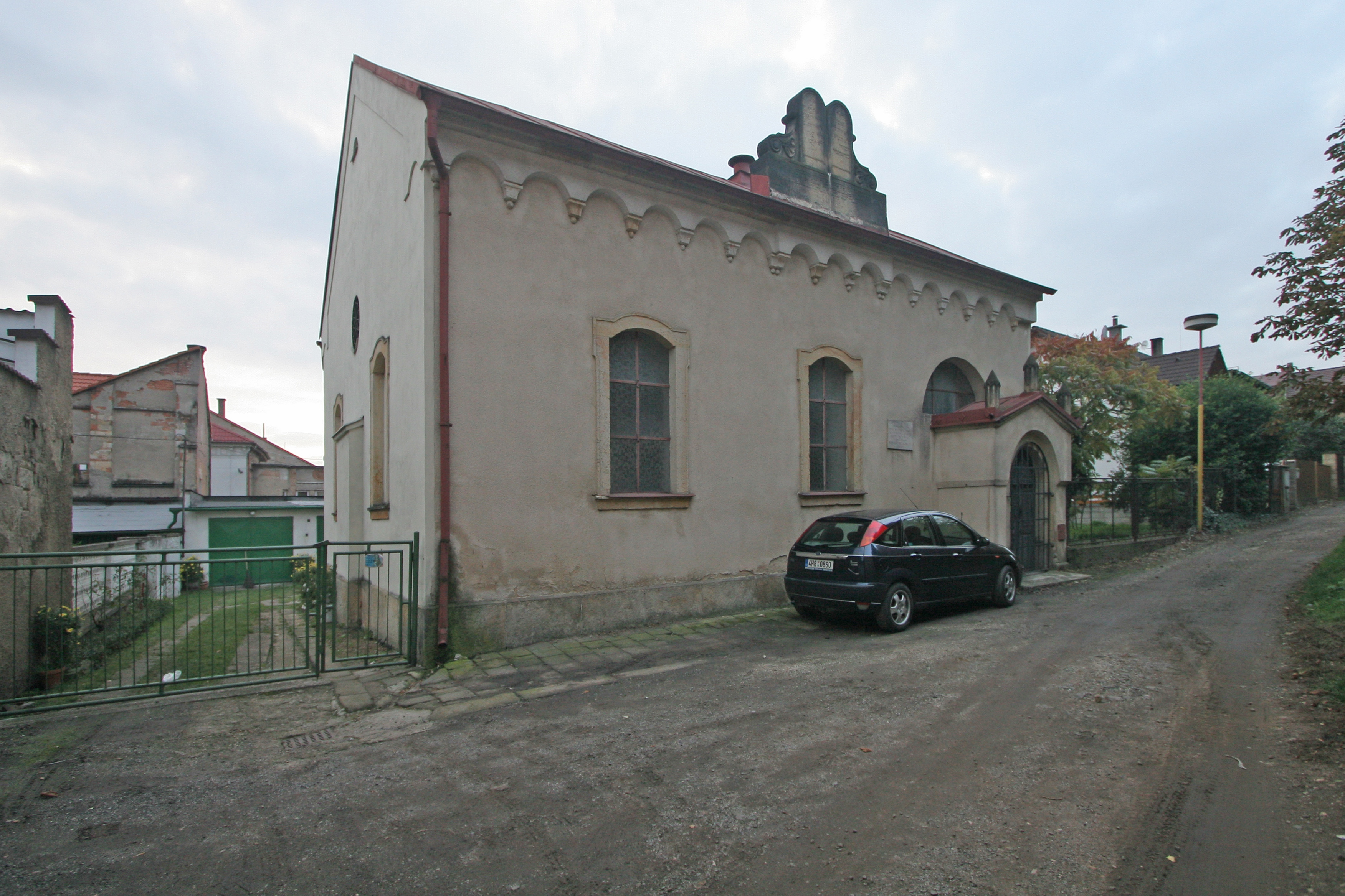 Synagoga (Hořice), Tovární 4, Hořice